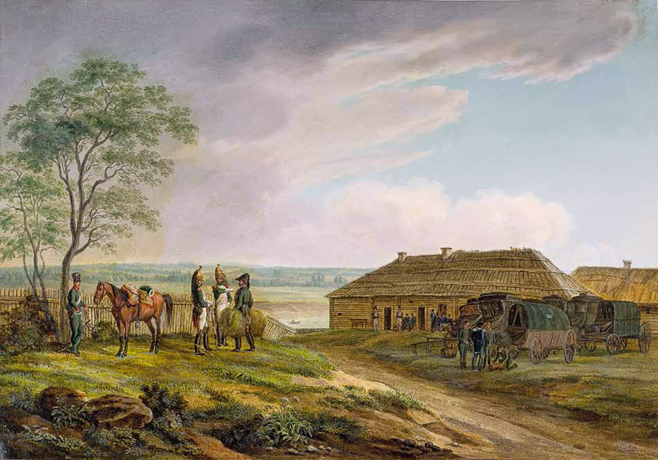 Беларуская (тарашкевіца): Вялейка (Vialejka). 16 ліпеня 1812